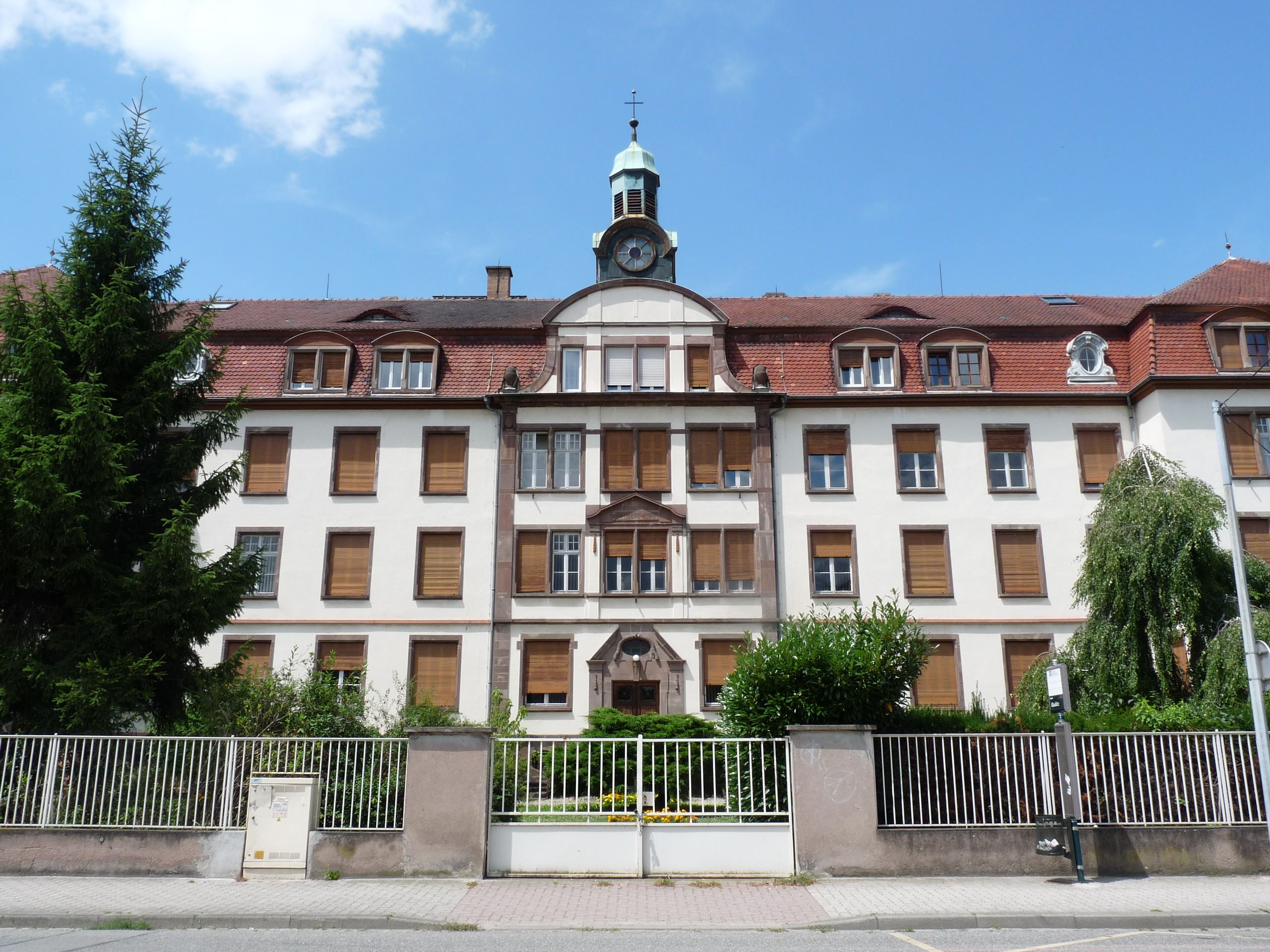 Centre Auguste Jacoutot pour déficients auditifs au Neuhof (Strasbourg)